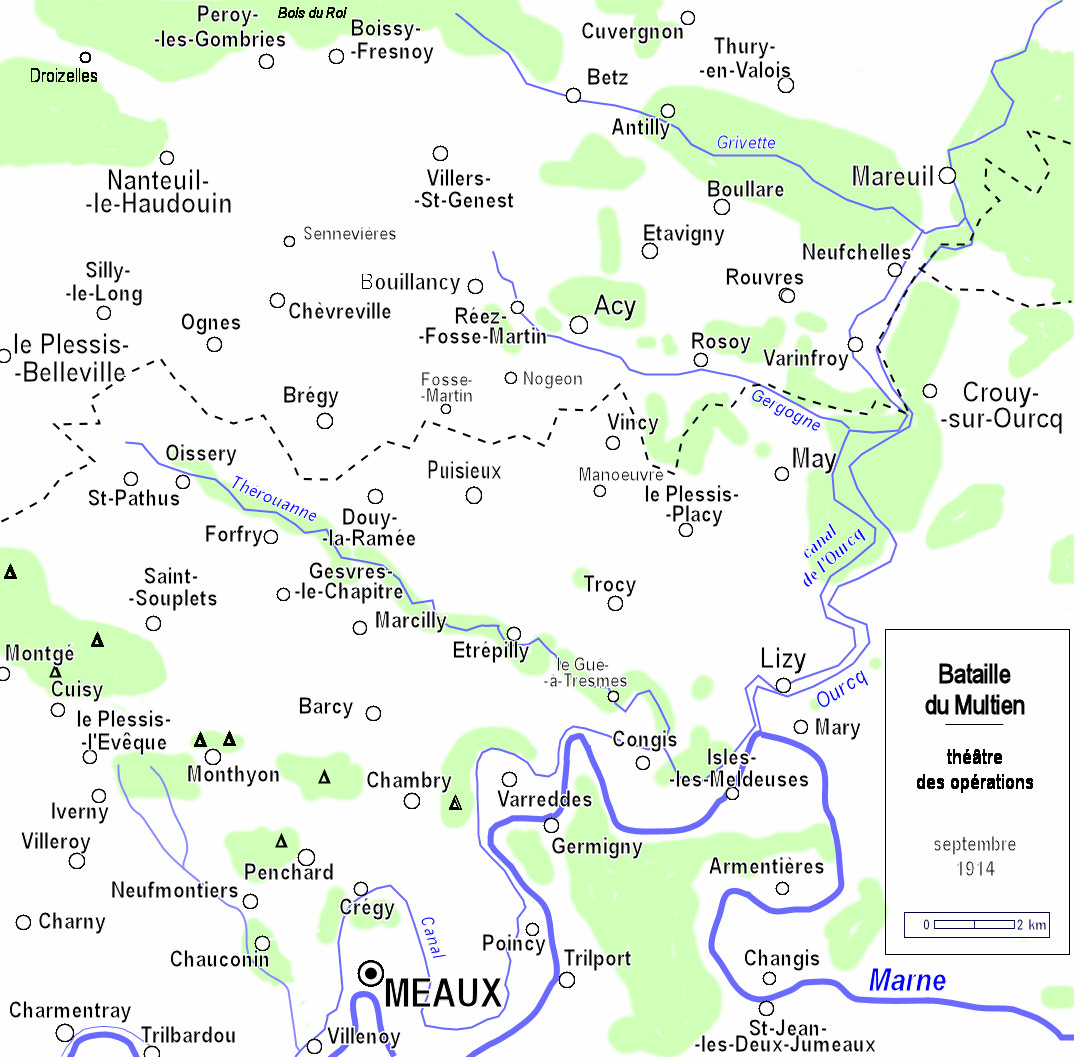 Bataille du Multien, théâtre des opérations